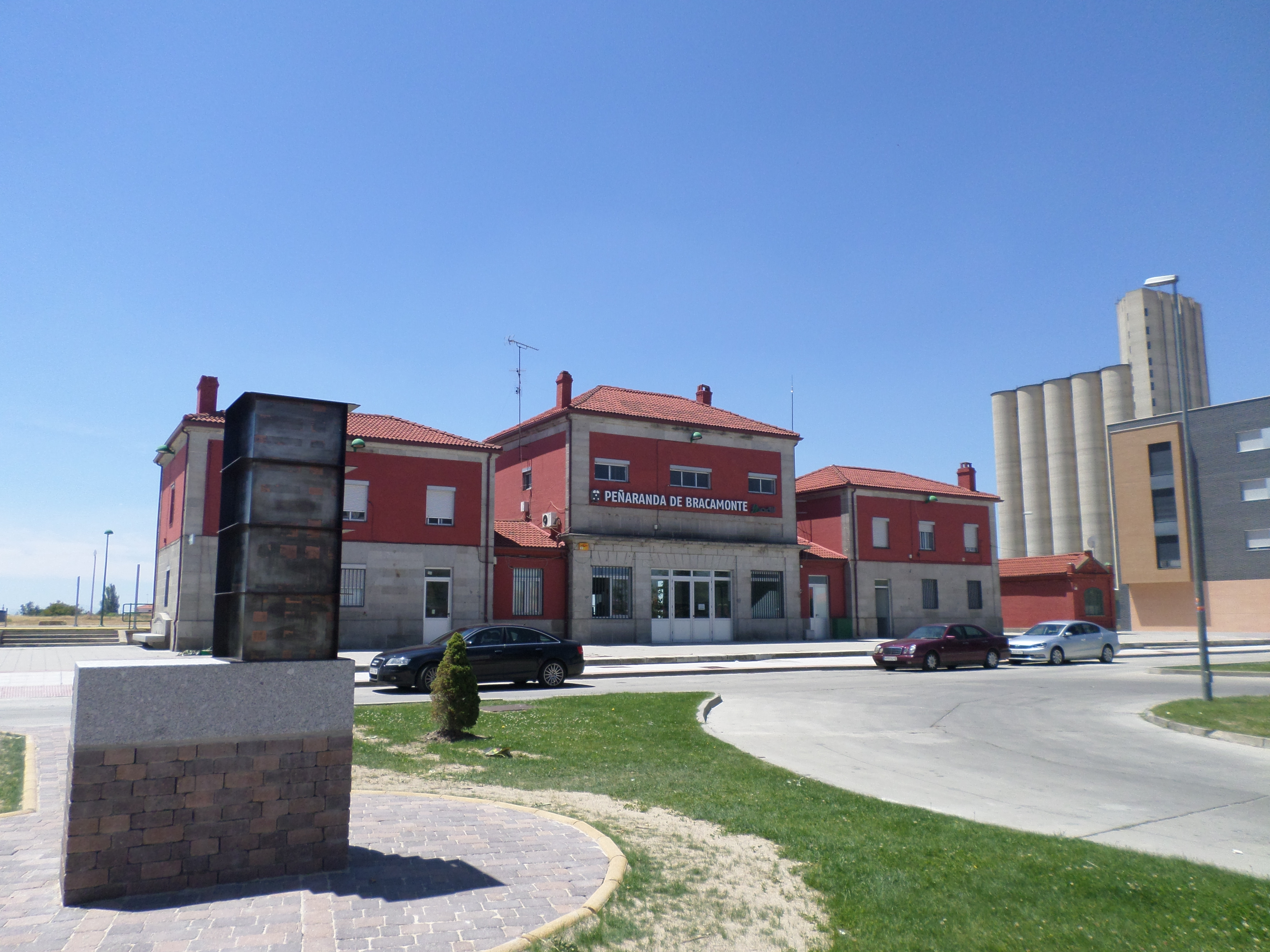 En la imagen se aprecia a la izquierda en primer plano el Monumento a las Víctimas de la Catástrofe de El Polvorín, explosión de un tren militar y un polvorín ubicado en la estación que provoco la destrucción de gran parte de la ciudad en el año 1939. En segundo plano en el centro se aprecia la Estación de Ferrocarril de Peñaranda de Bracamonte, parada en las Líneas media distancia Salamanca-Madrid (Chamartín) y Salamanca-Ávila. Finalmente al fondo a la derecha se observa el Silo mayor, basta infraestructura empleada durante el S. XX para el almacén de cereales provenientes de los amplios campos de cultivo de la Comarca del Campo de Peñaranda.